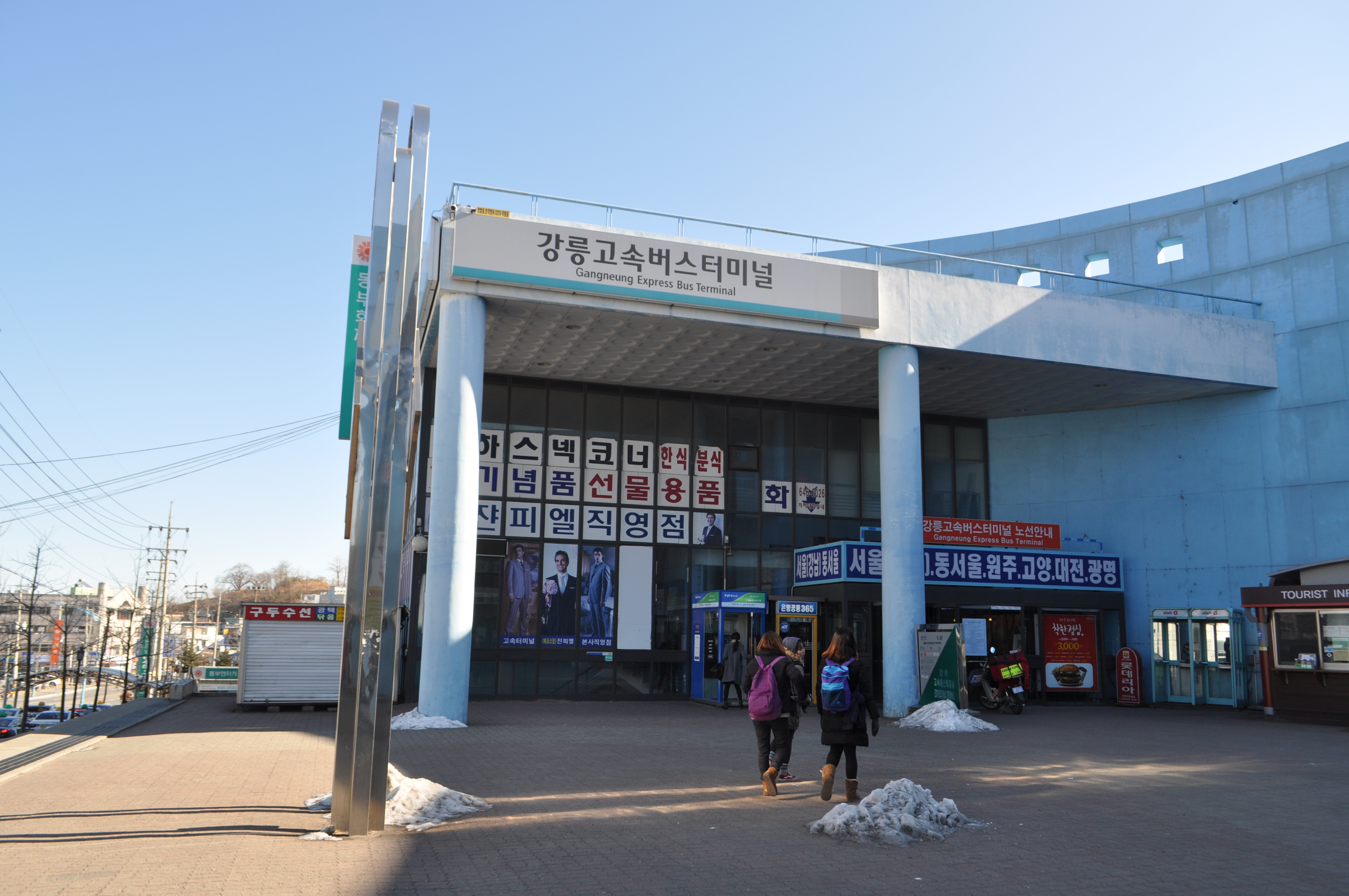 강릉고속버스터미널의 모습